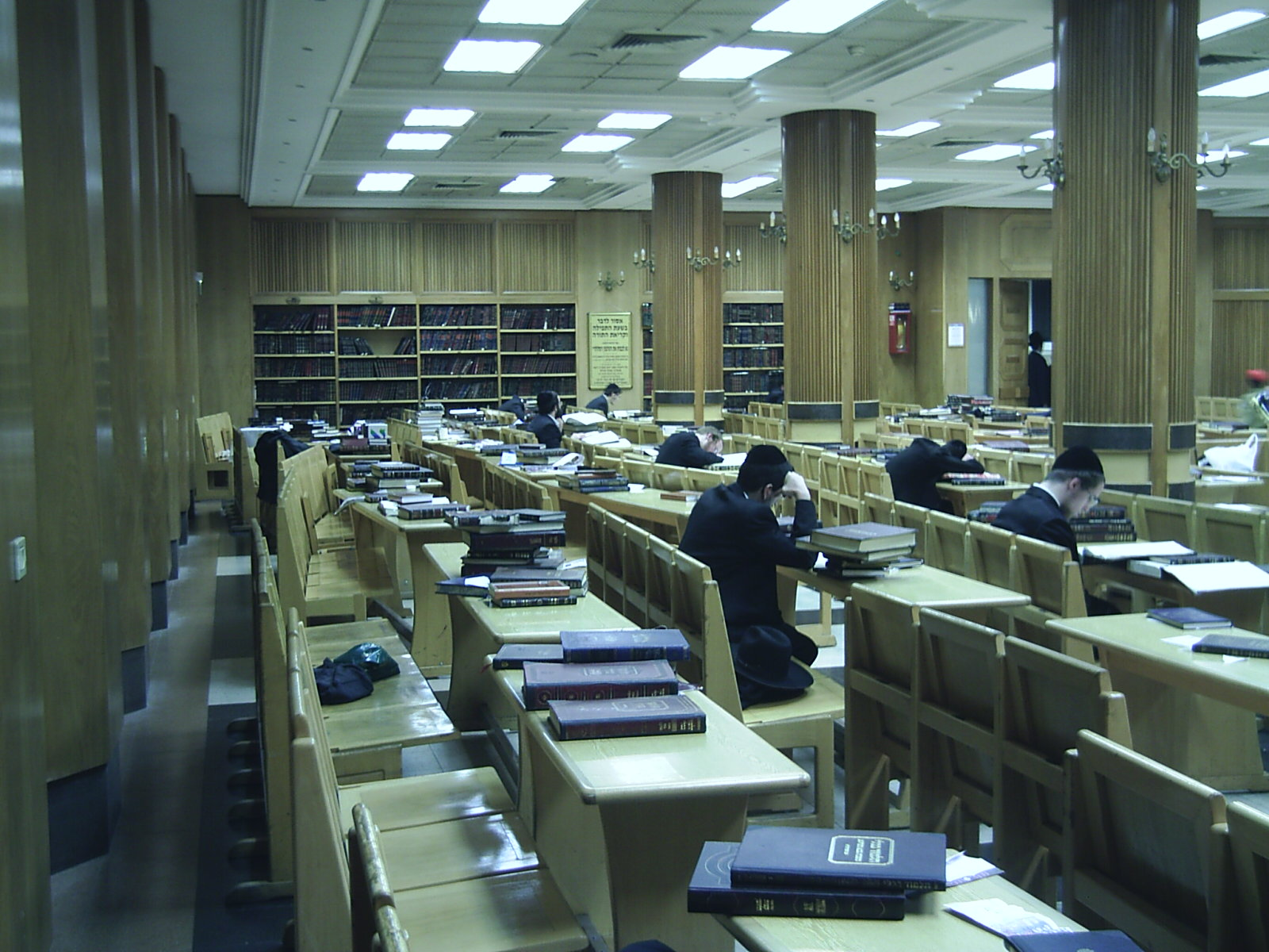 Klein beis midrash in Belzer hoofdkantoor te Jeruzalem. Zelf gemaakt tijdens Purim 5766.